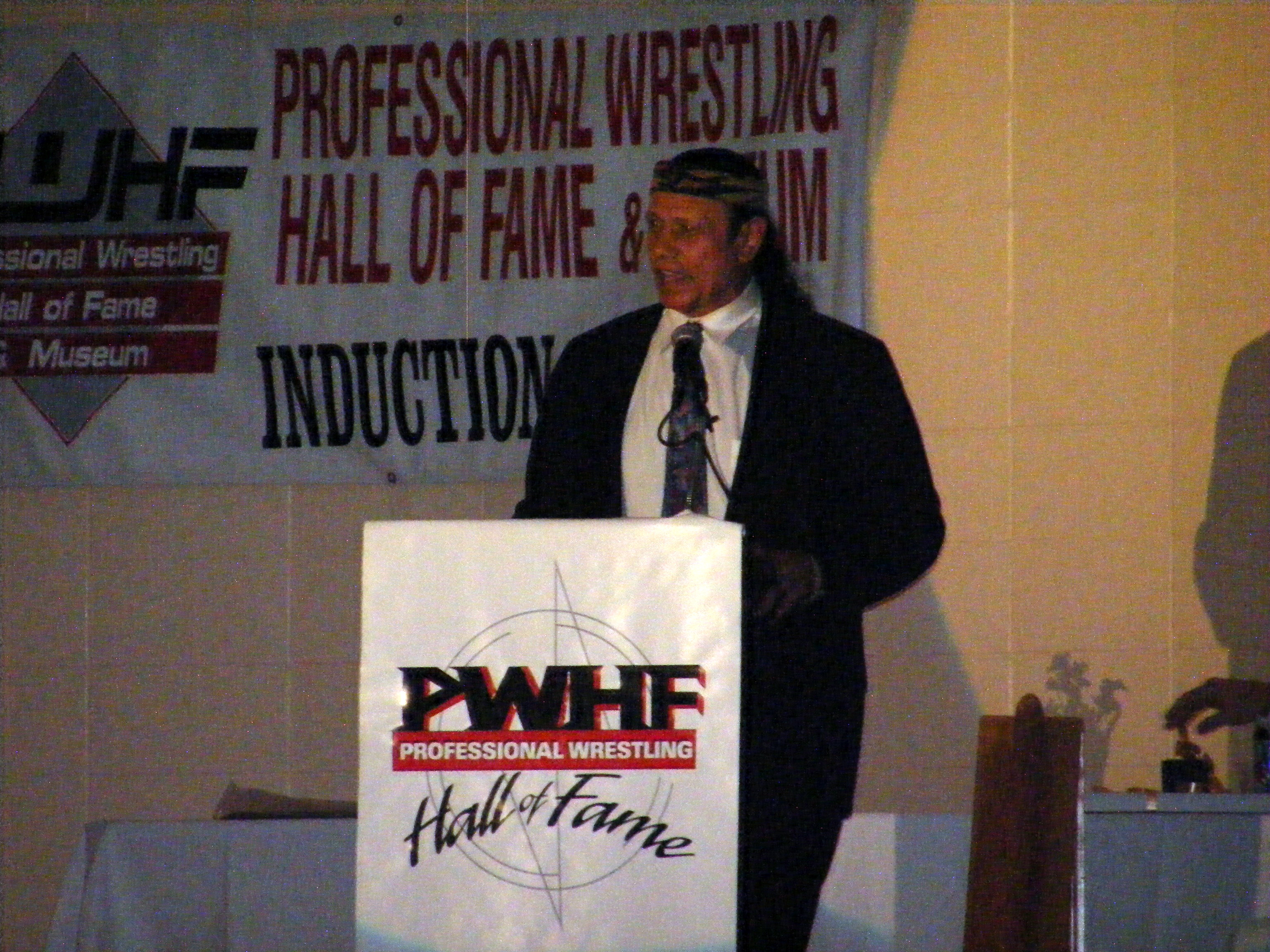 Jimmy Snuka durant le banquet du Professionnal Wrestling Hall of Fame and Museum de l'année 2012.